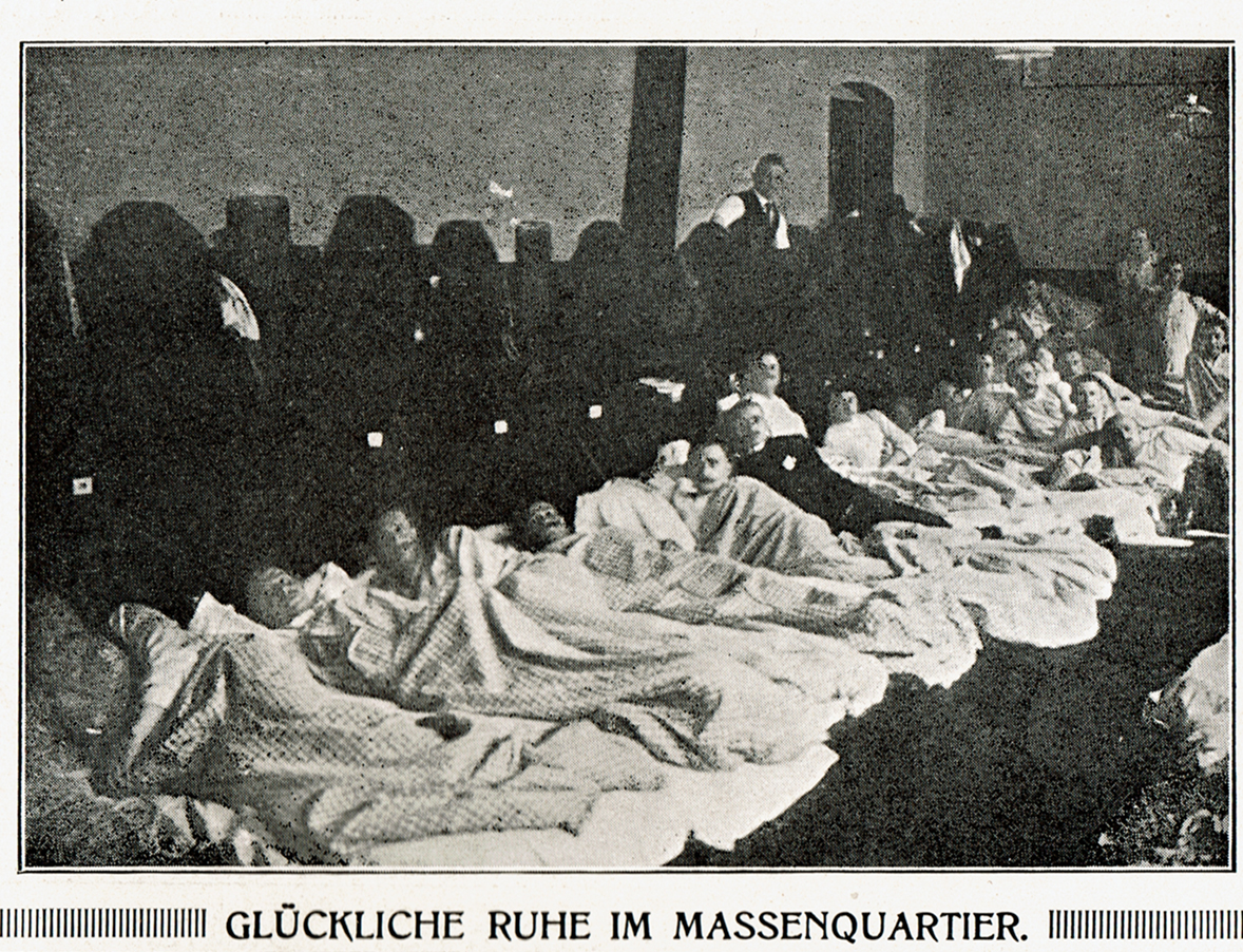 Deutsches Turnfest 1913in Leipzig, Blick in ein Massenquartier